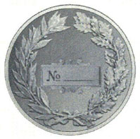 Медаль «За отвагу на пожаре», Российская Федерация